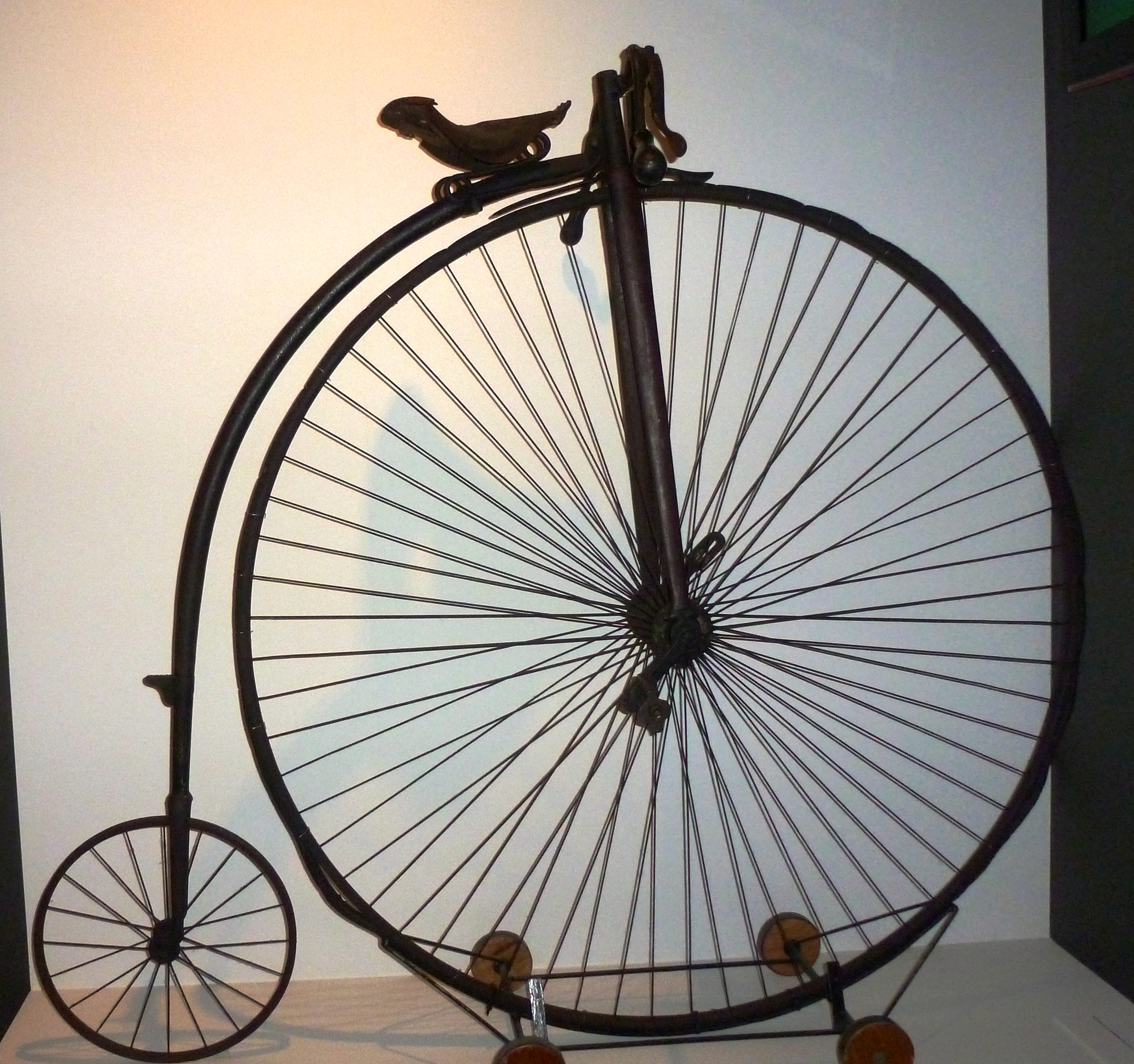 Hochrad, ca. 1887, gehörte dem Fotografen Léonard Misonne (1870-1943), im National Wielermuseum in Roeselaere, Belgien